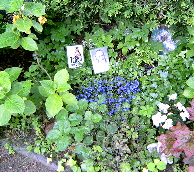 Grab Manfred Salzgeber 2015. Berlinale/Panorama-Leiter, Teddy-Award Mitgründer. Seit Herbst 2014 umgebettet in Abt X3 auf Alter St.-Matthäus-Kirchhof. Foto L. Wekenborg (StMatthaeus)